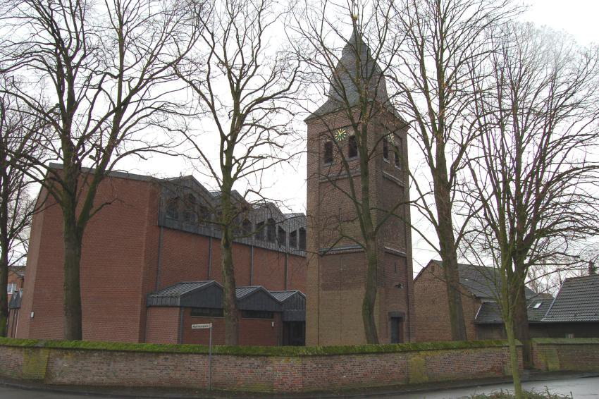 St. Matthäuskirche in Grevenbroich-Allrath